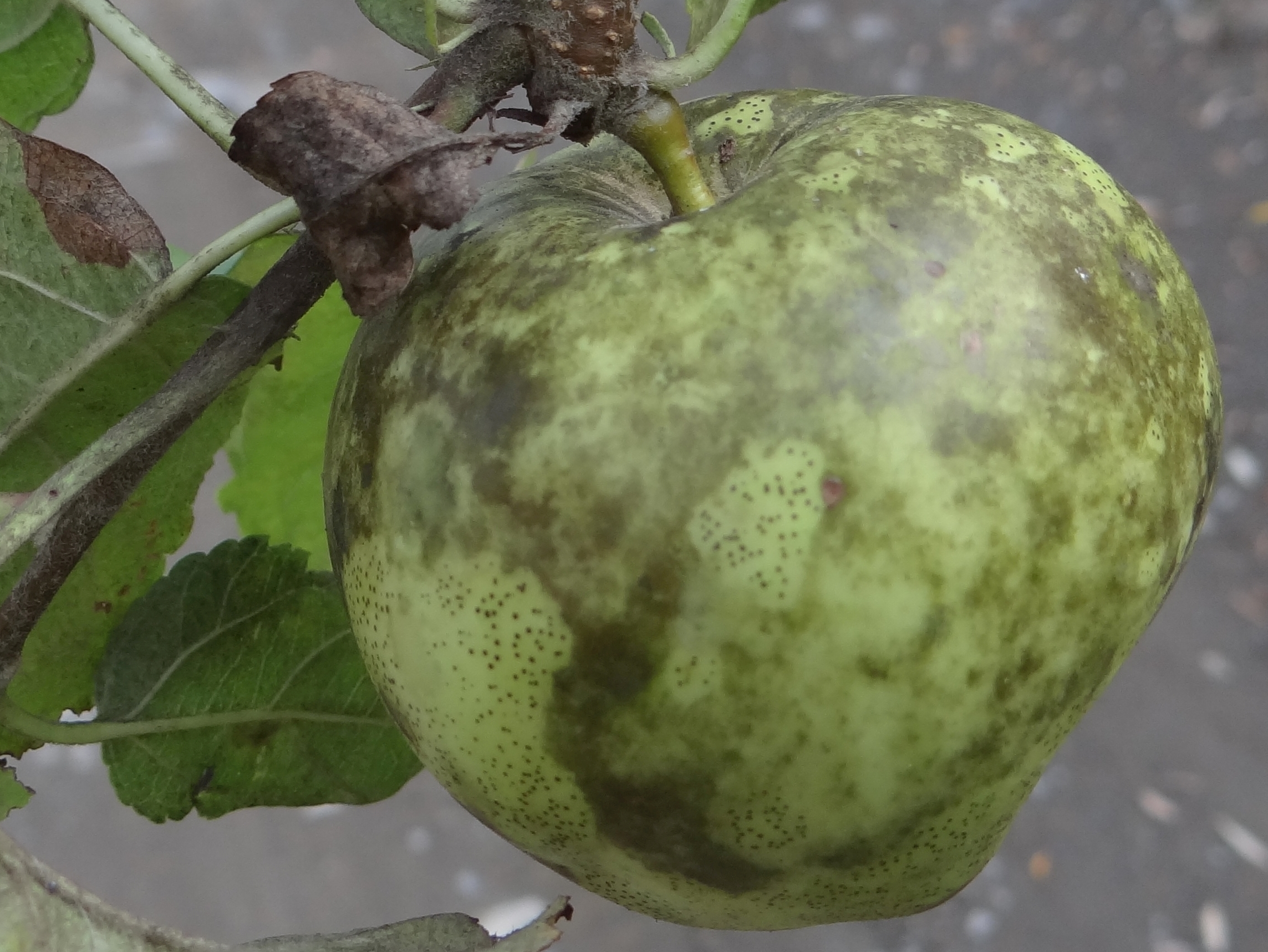 Schizothyrium pomi on fruit Malus domestica. Location: Poland, Trzciana, województwo małopolskie